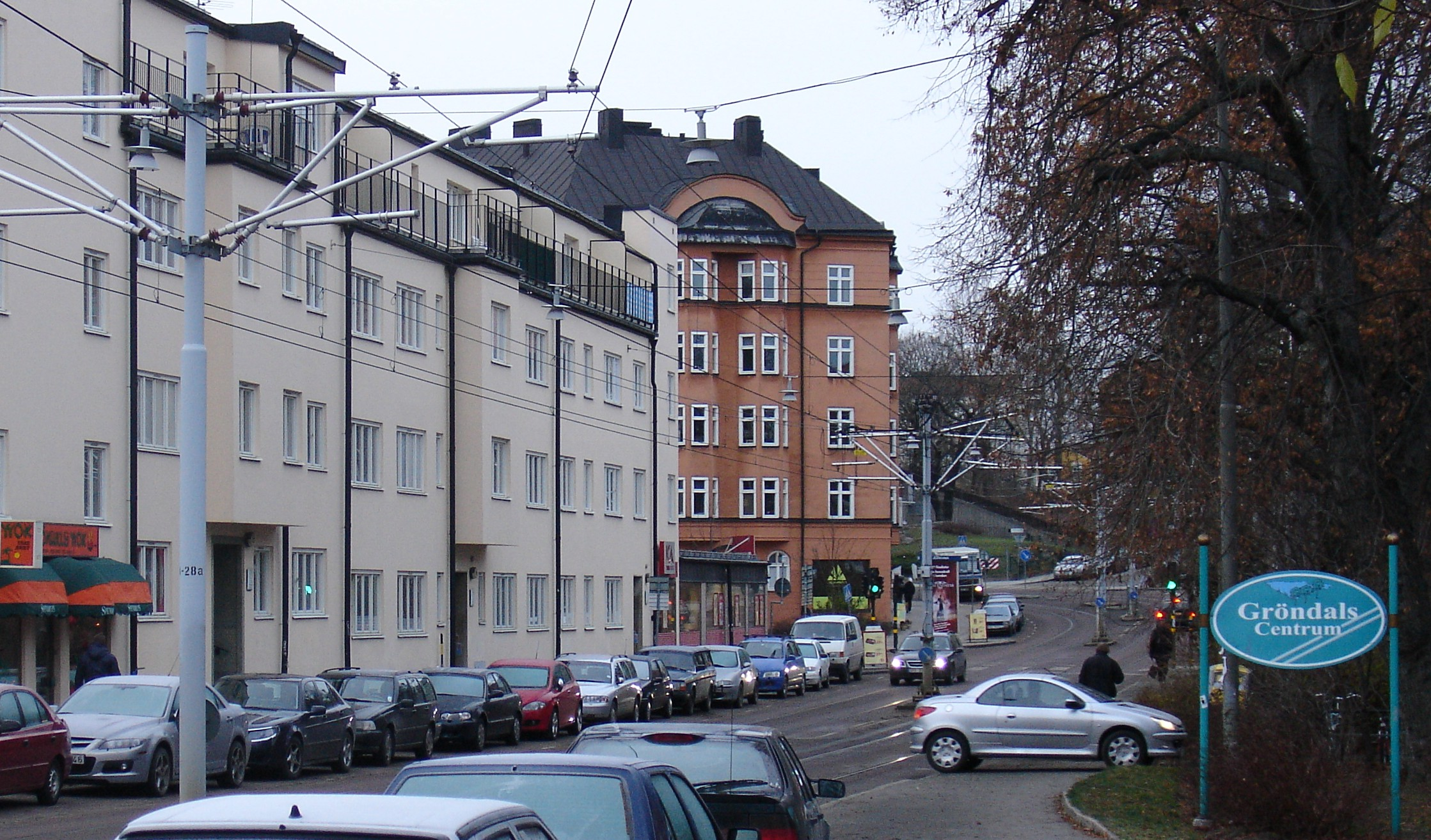 Gröndals centrum (Gröndal i Stockholm)